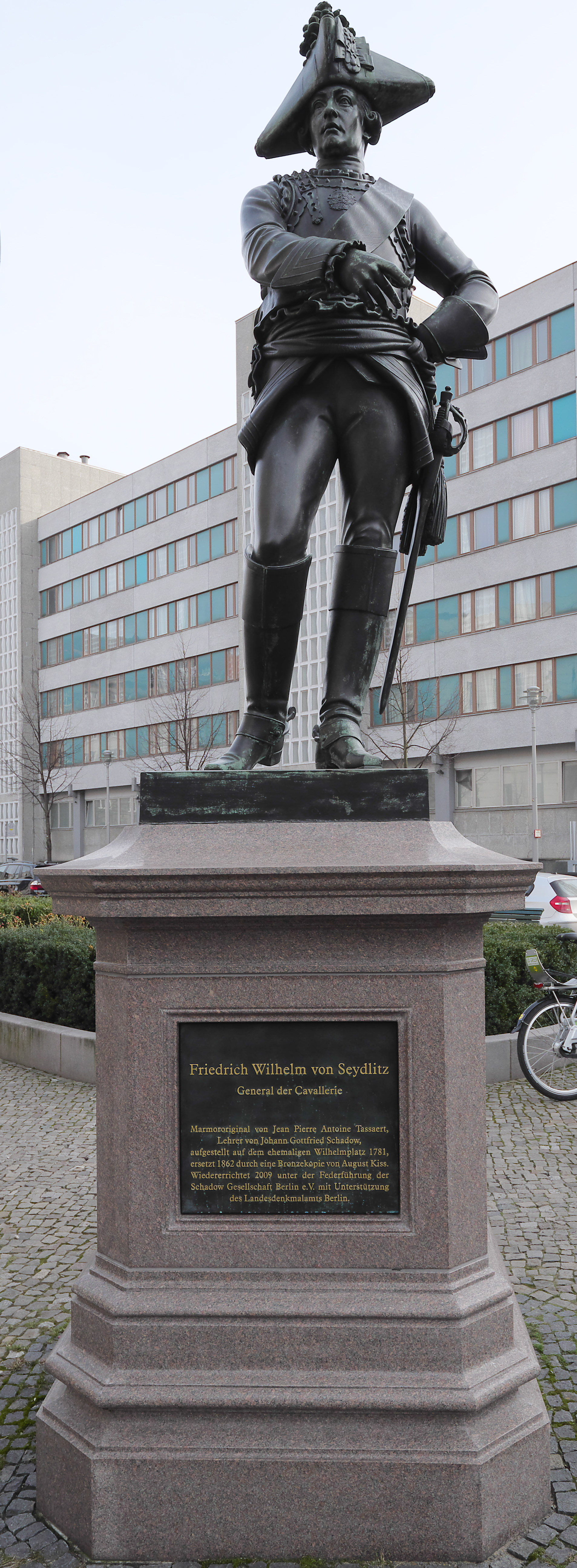 Denkmal von Friedrich Wilhelm von Seydlitz auf dem Zietenplatz in Berlin-Mitte